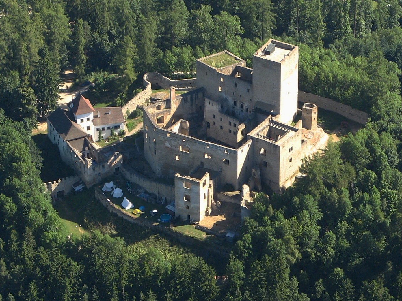 Hrad Landštejn, zřícenina a archeologické stopy (Staré Město pod Landštejnem), Staré Město pod Landštejnem